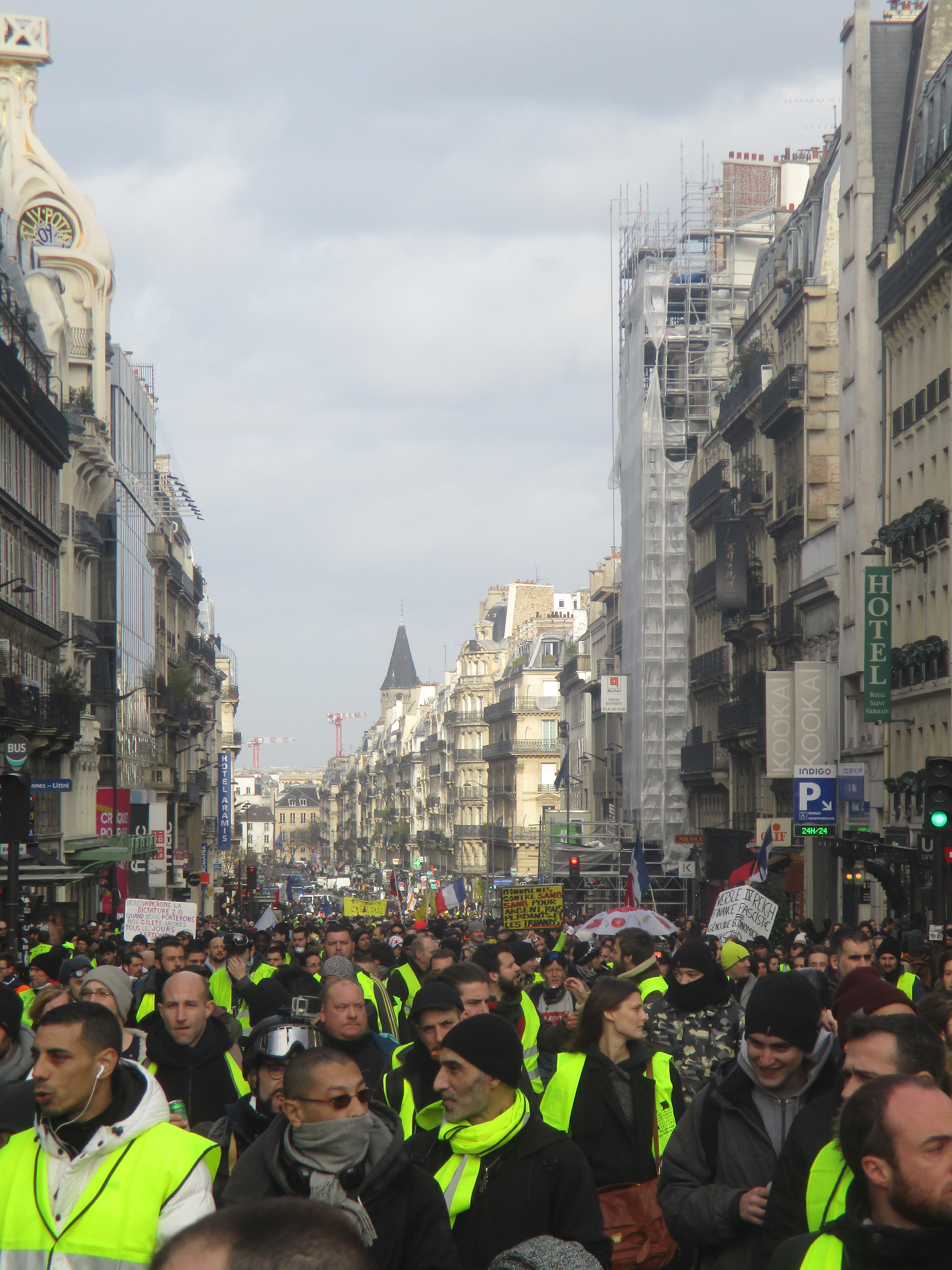 Le cortège des gilets jaunes défile à Paris rue de Rennes après être passé devant le Sénat. Samedi 9 février 2019.